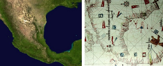 Mapa de Pedro Reinel após rotação de 90º, confrontado com a linha da costa do México.